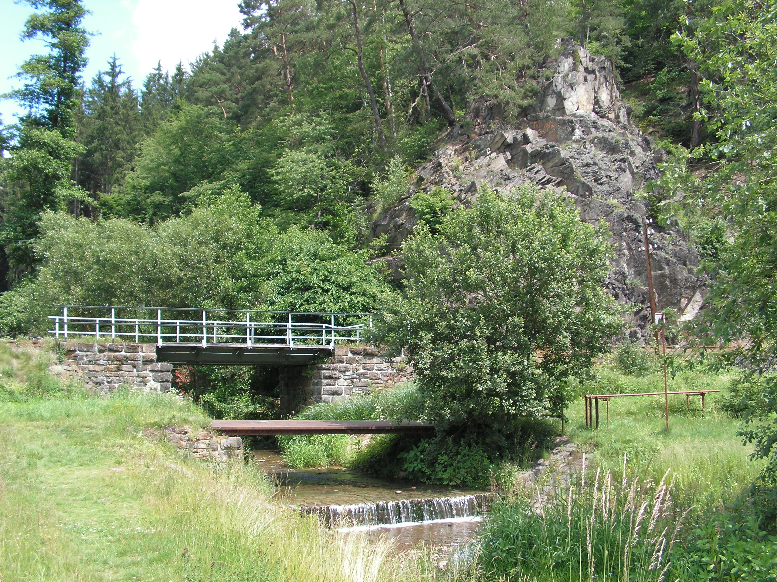 Potok Jestřebnice několik metrů nad ústím do Sázavy.